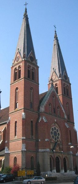 Cerkev Sv. Martina v Šmartnem pri Litiji.